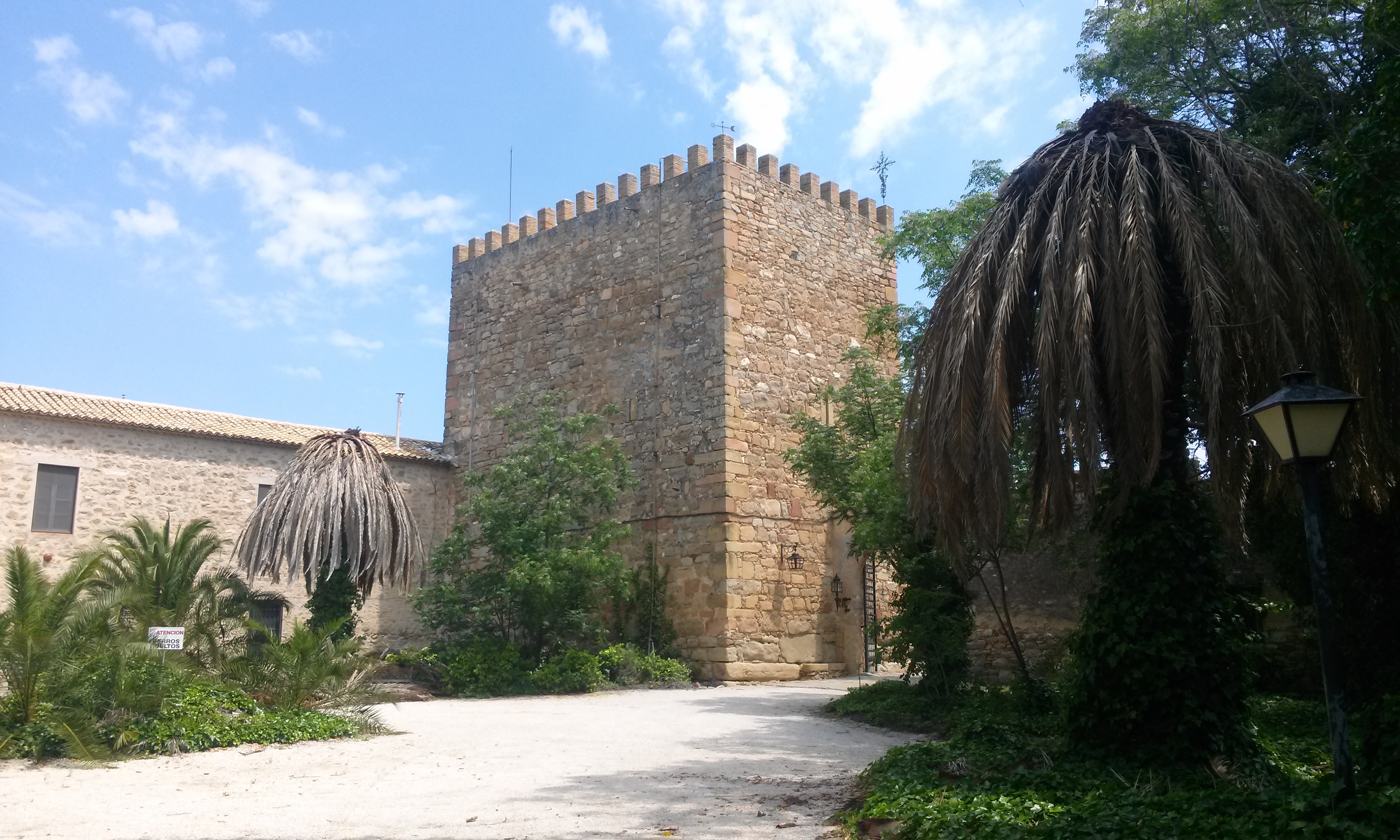 Torre del homenaje del Castillo de Espelúy.